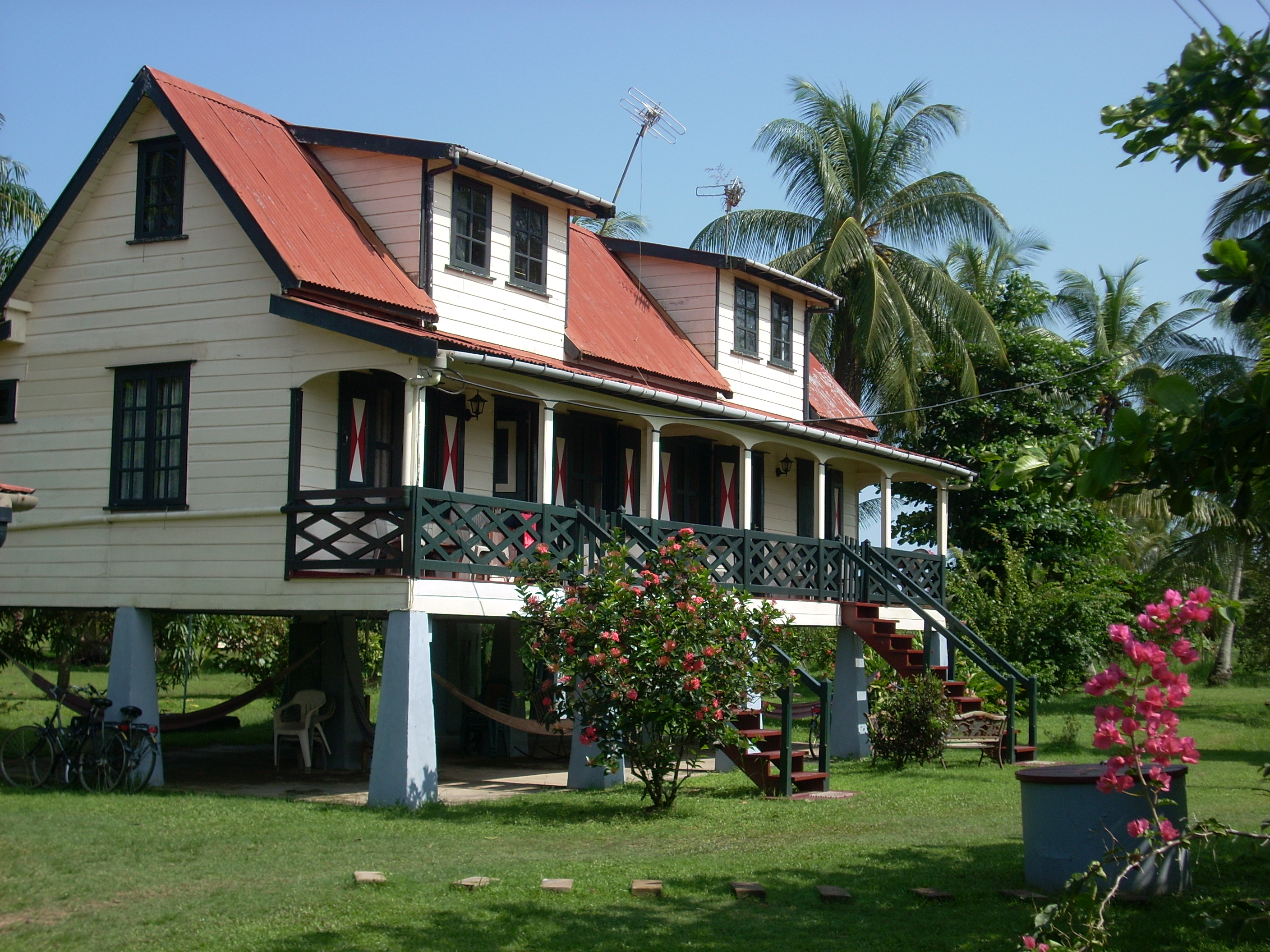 Frederiksdorp